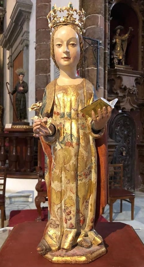 Se trata de una talla de madera policromada de aspecto medievalista que fue llevada a la isla de Tenerife por el conquistador Alonso Fernández de Lugo a fines del siglo XV. Se encuentra en la Iglesia Matriz de la Concepción de la ciudad.